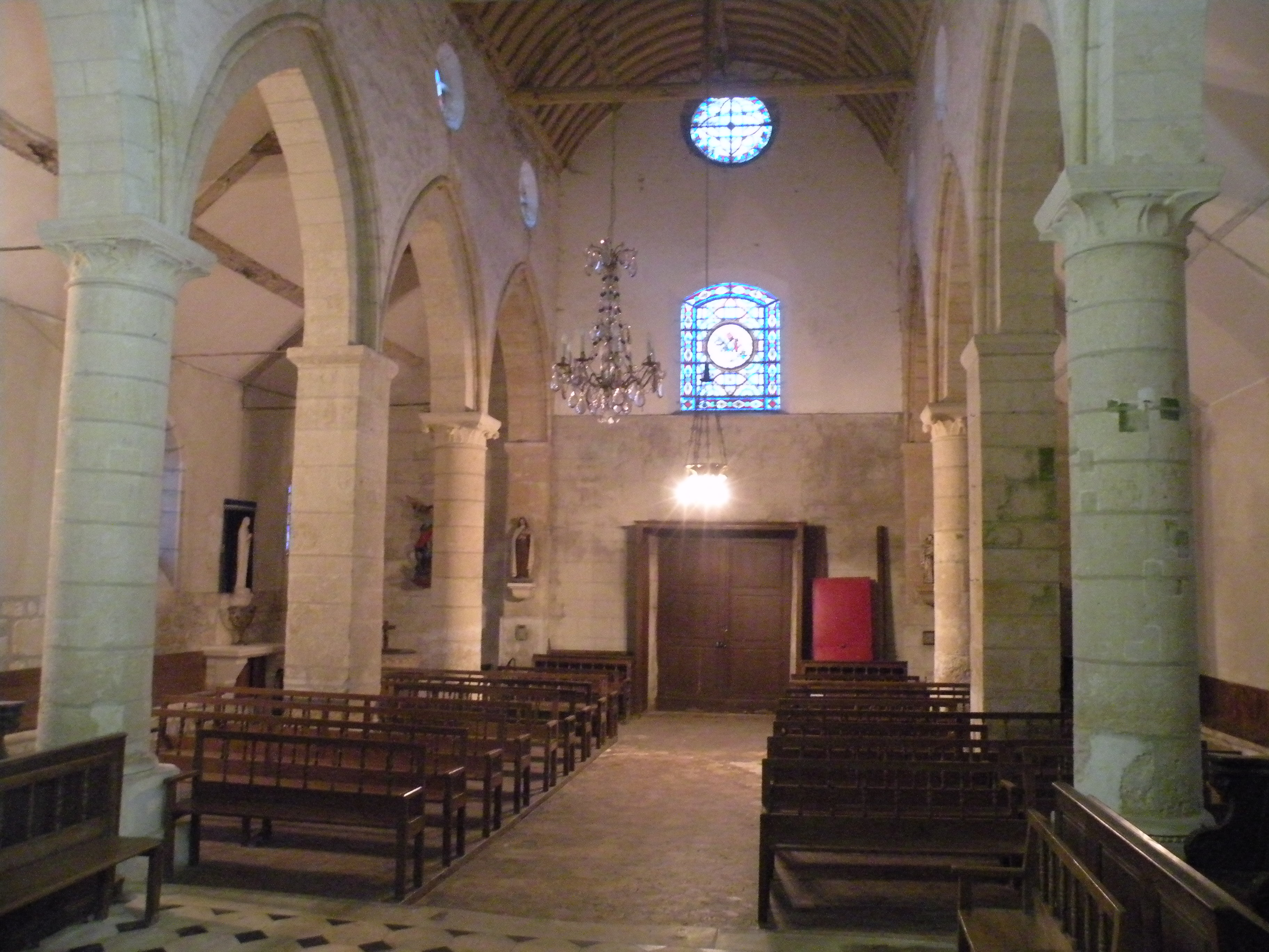 Intérieur de l'église Saint-Martin de Frouville